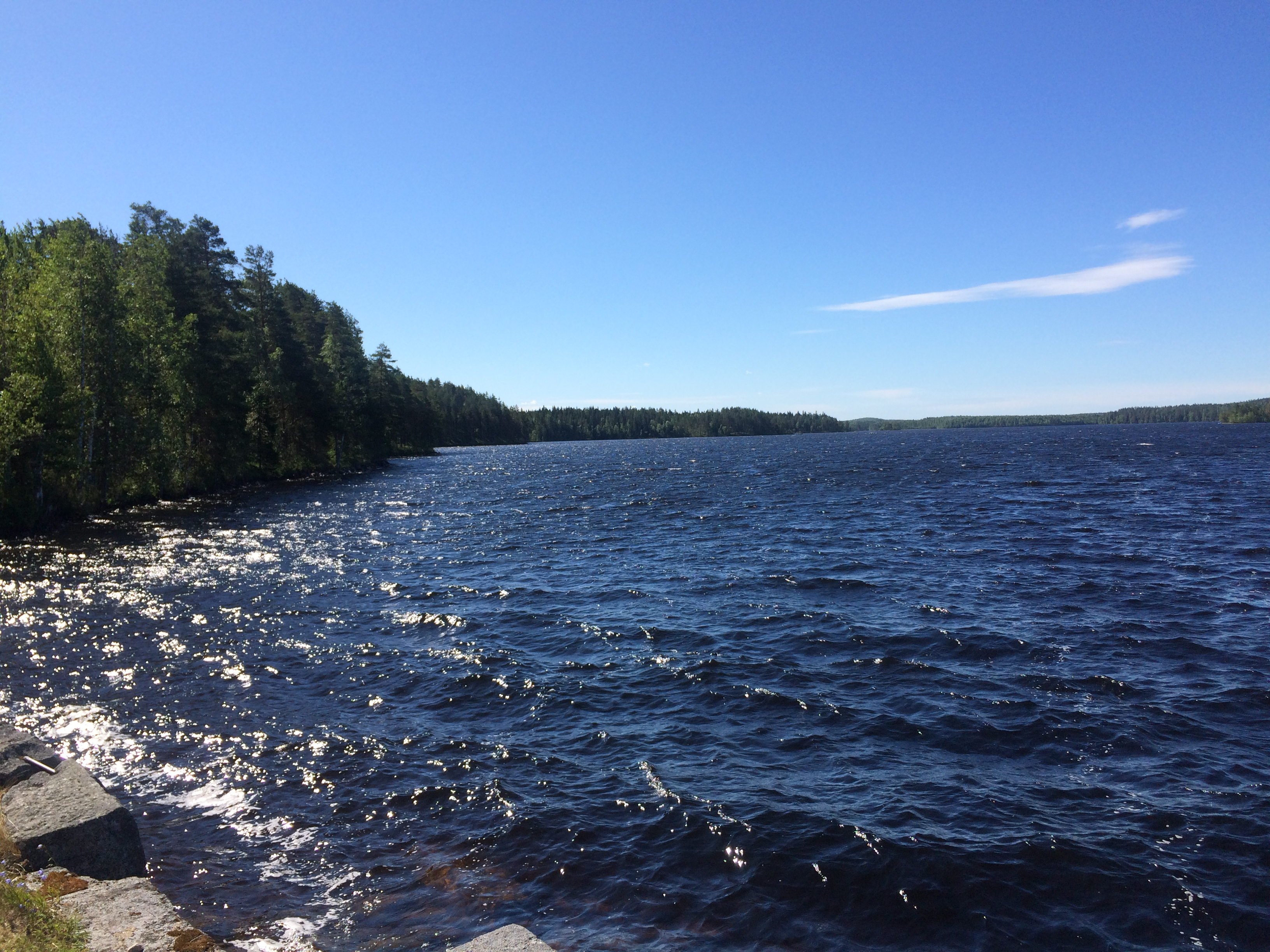 Толвоярви